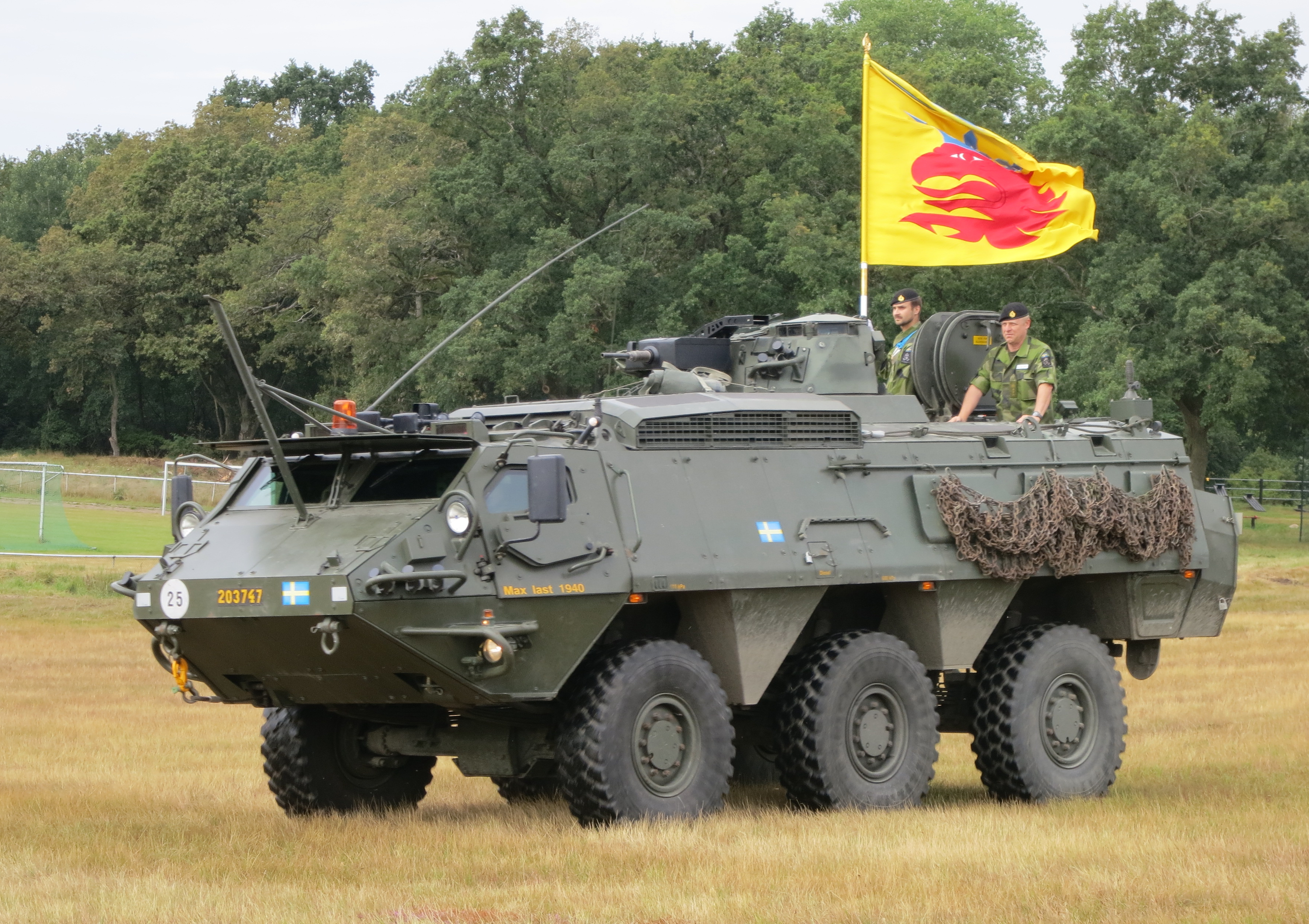 Förbandschefen anländer till Regementets dag på P7 Revingehed 2012 i Pansarterrängbil 203 Patria.